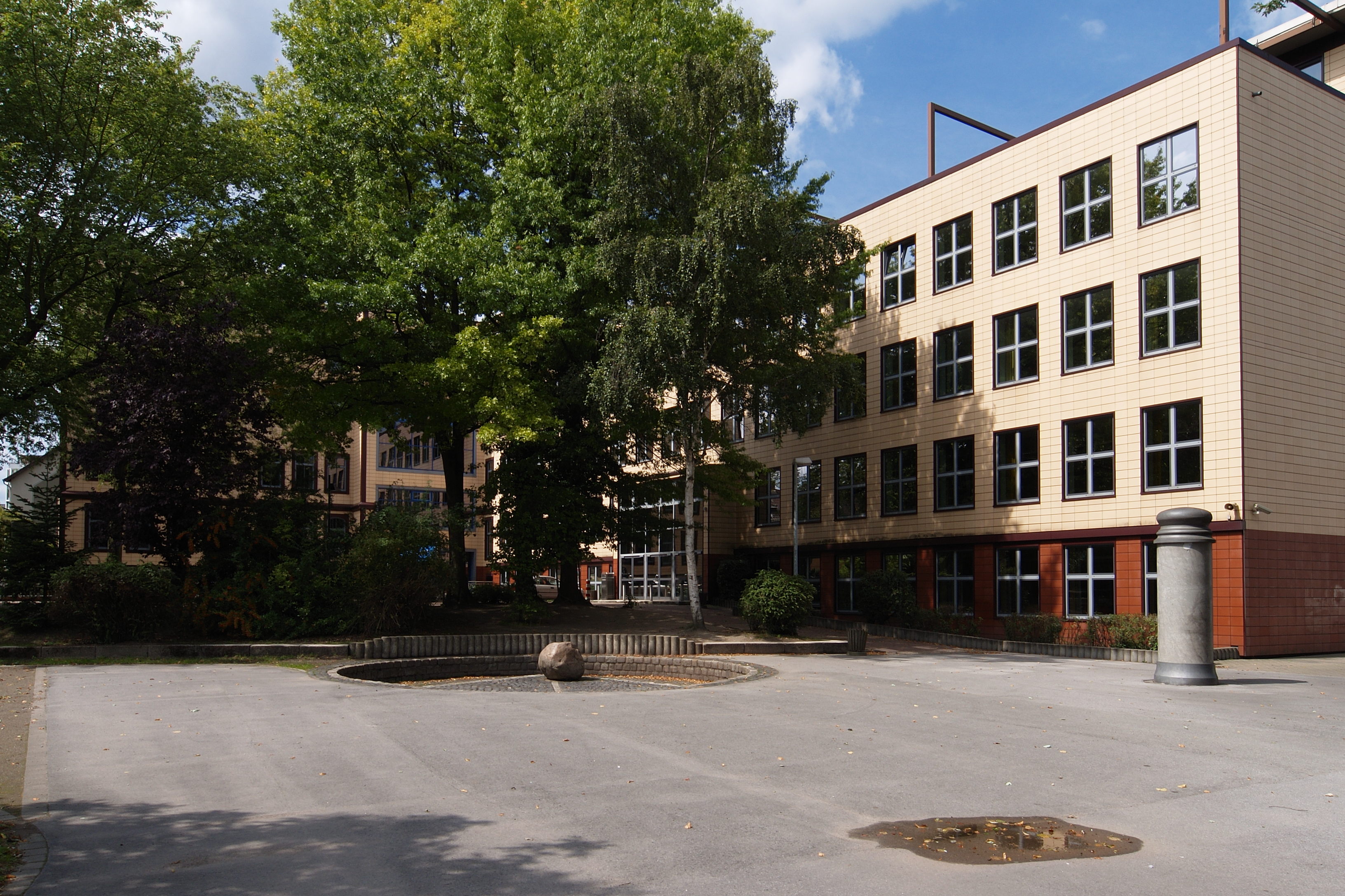 Gebäude das Haranni-Gymnasiums in Herne-Mitte, Ansicht vom Schulhof aus (Osten)